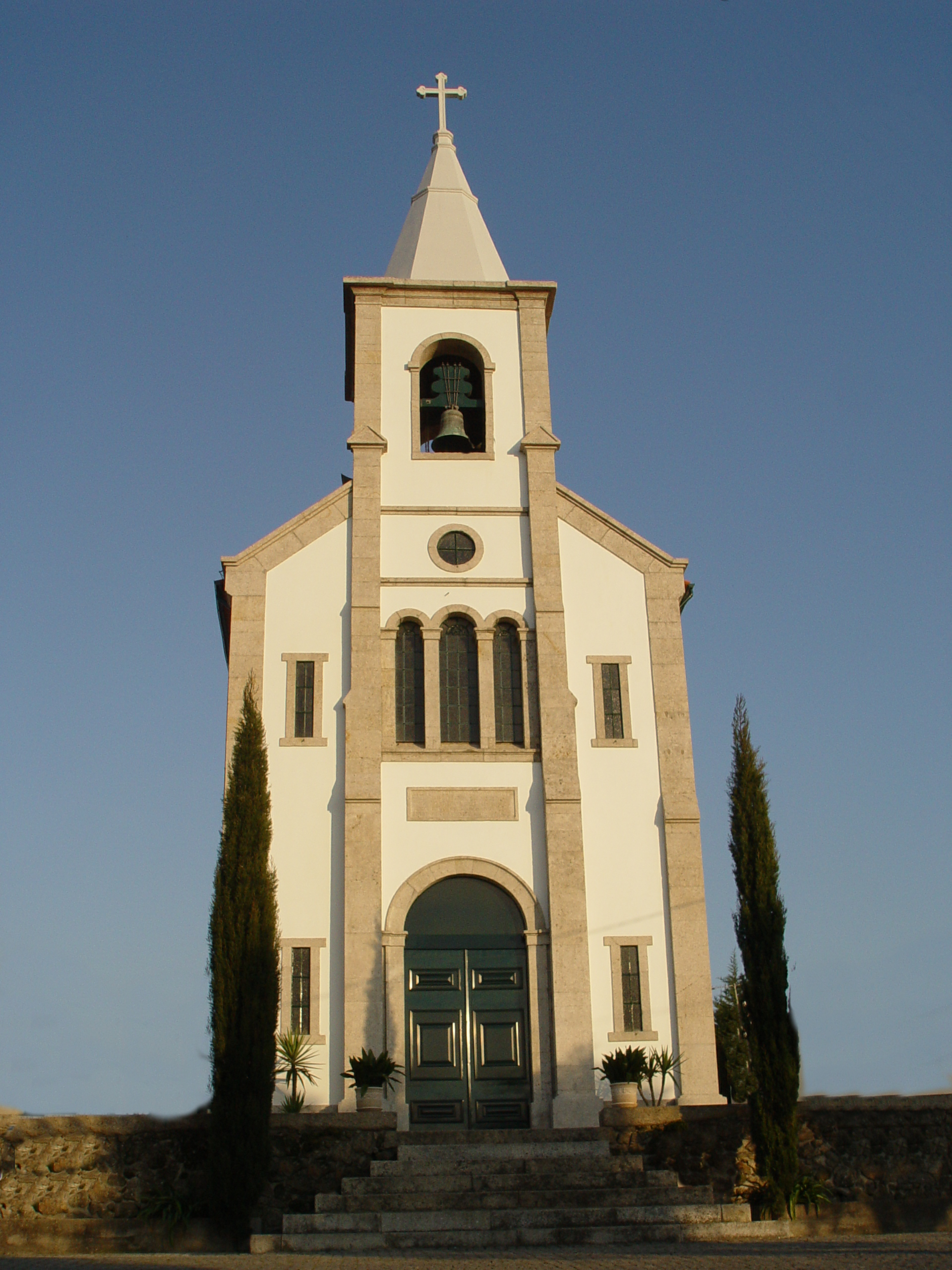 Parada de Tibaes Church in Braga